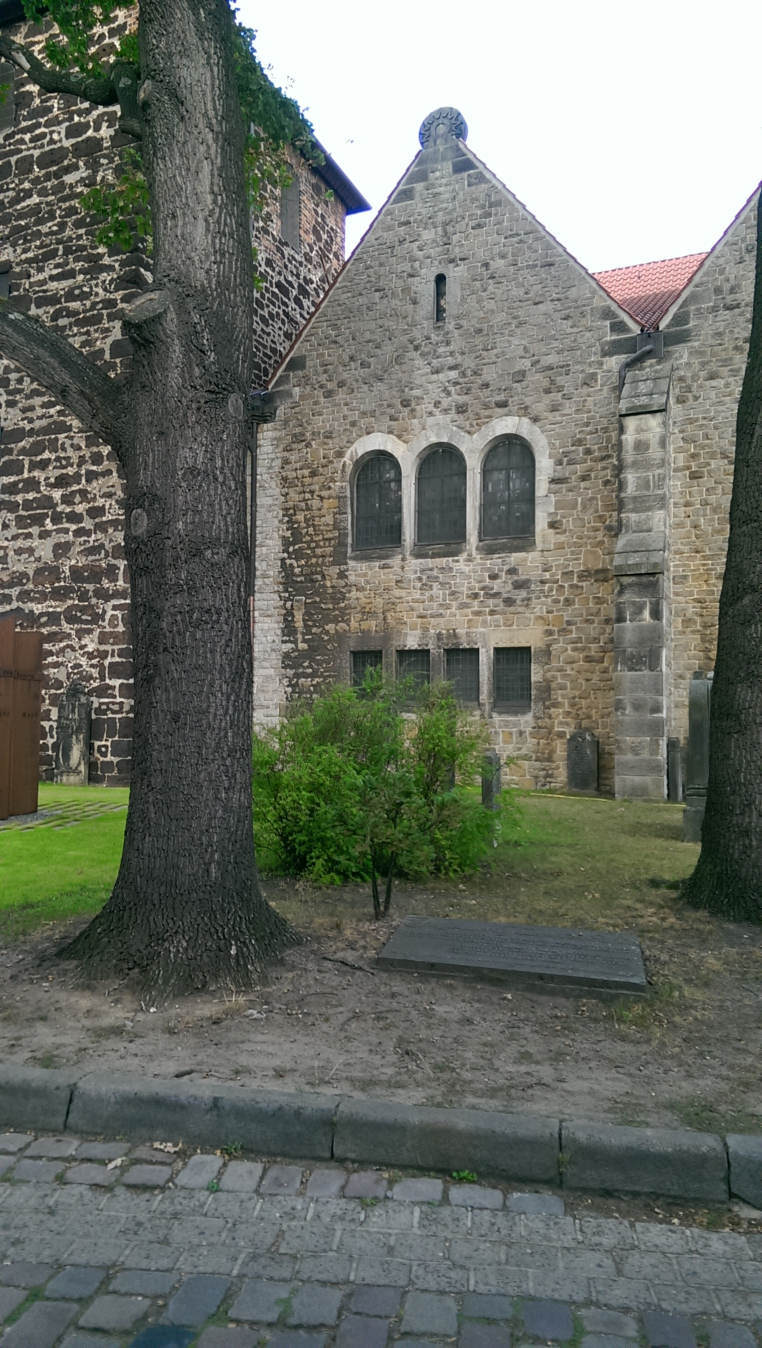 Gedenktafe in St. Nicolai - Bothfeld für den Schwiegerson von Pastor vom Berg